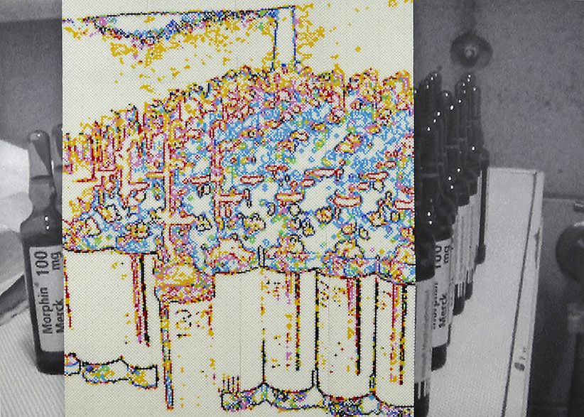 Saskia Schüler, "Morphium", 2015, Bügelperlen Mini und Foto auf Dibond, 68 x 90 cm